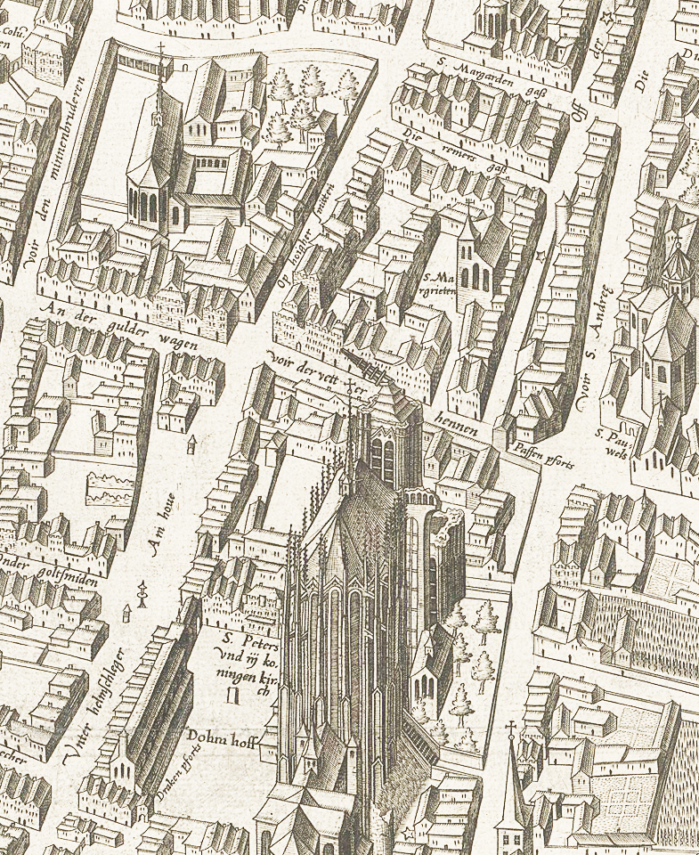 Ausschnitt des Mercator – Stadtplanes Köln. Bereich „Dom, An der Rechtschule und Minoriten sowie vor St. Andreas, der Anfang der heutigen Komödienstraße um 1570/71“